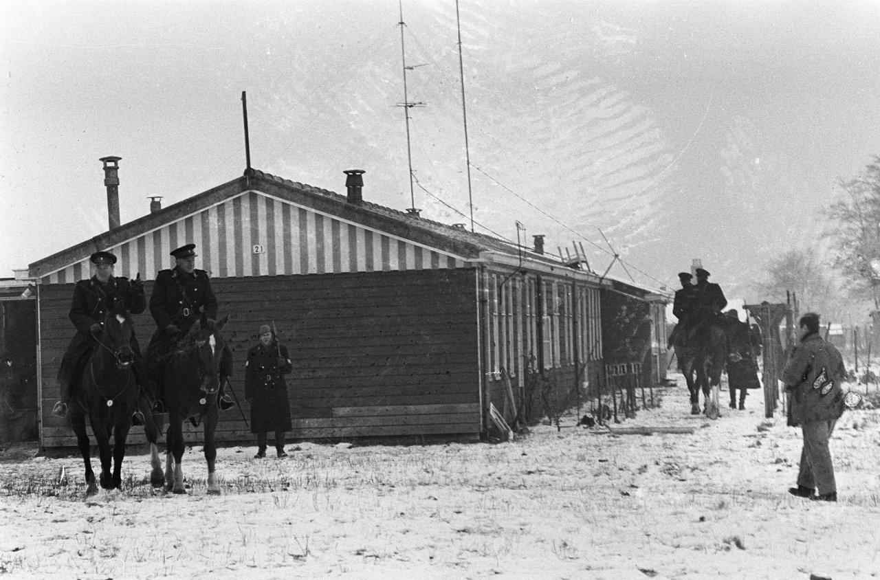 Ambonezen, KAMP, politiemacht, Kamp, Westerbork